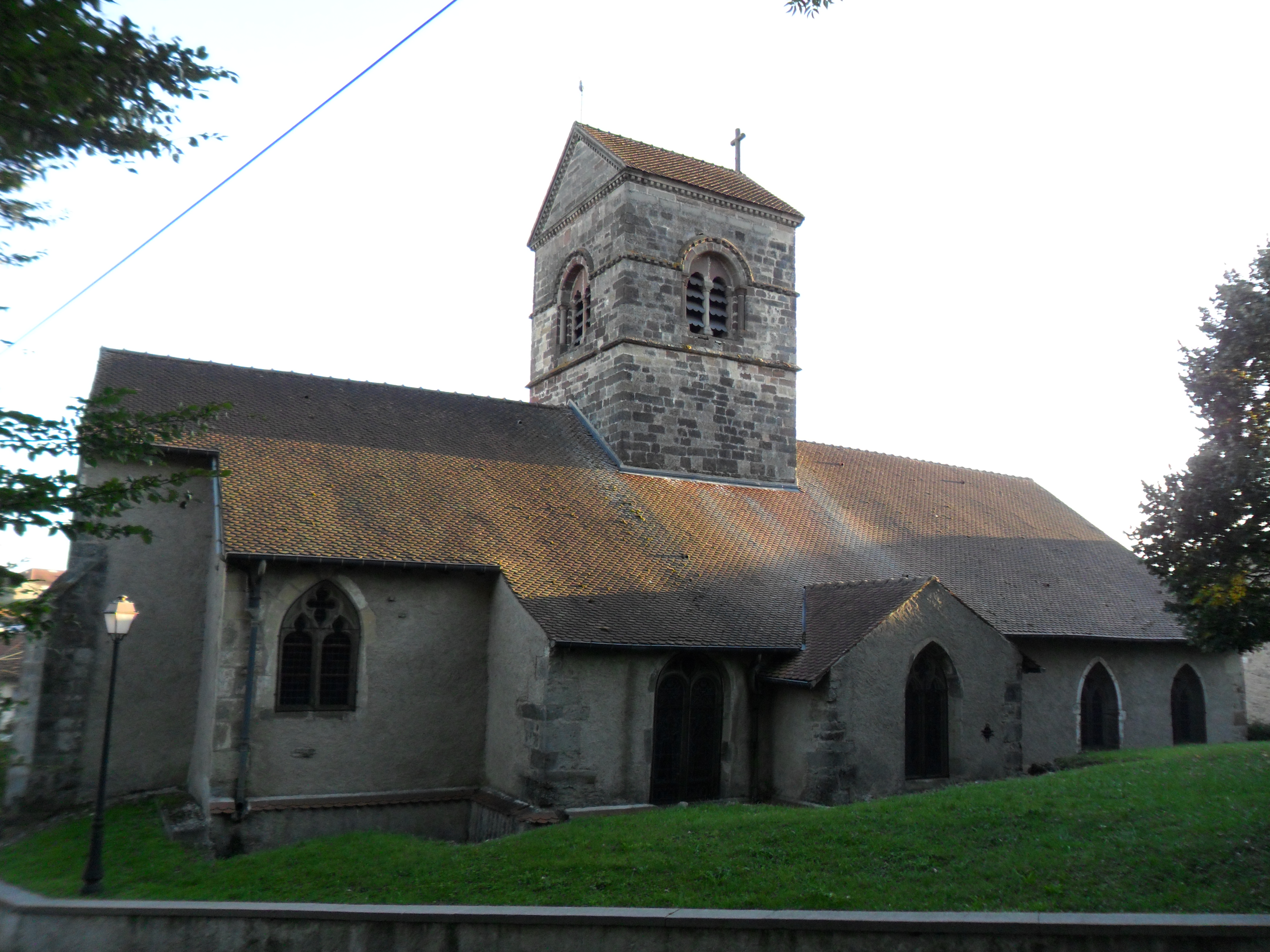 Eglise de Lignéville .